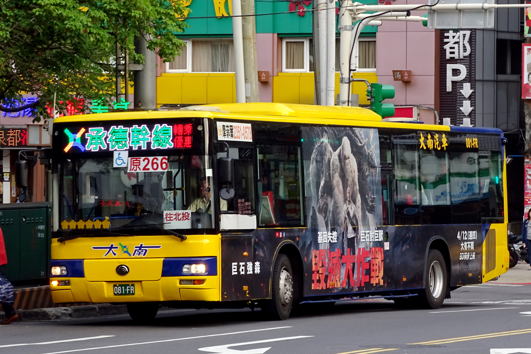 YOUTONG - ZK6128HG - 081-FR